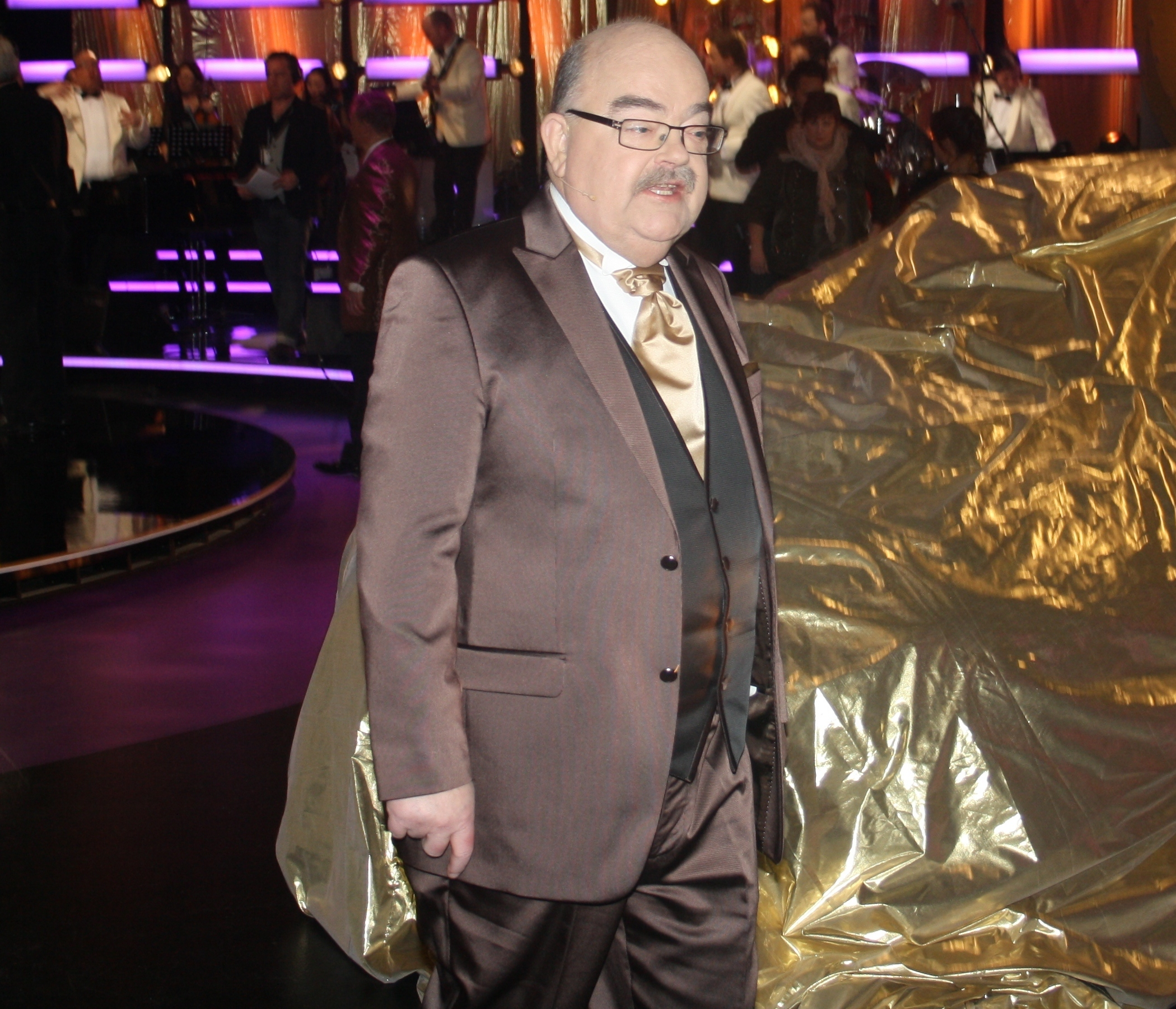 Loket var programledare på BingoLottos Guldkväll